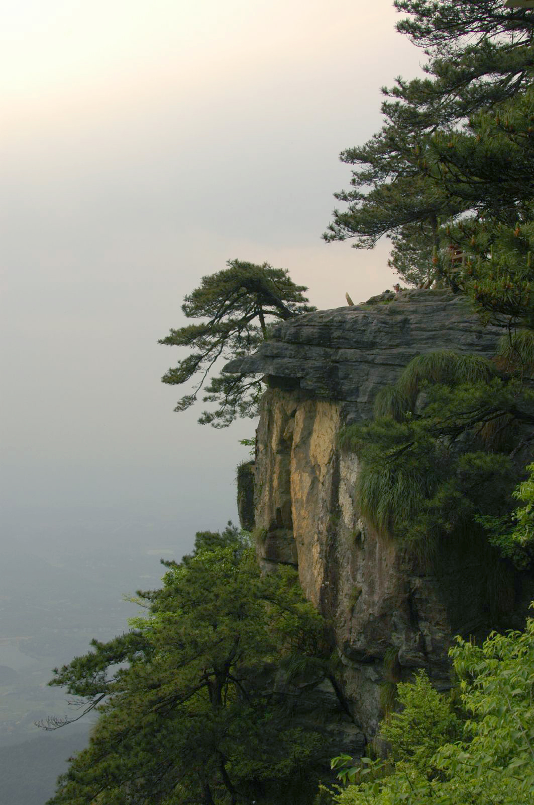 Huangshan Pine Pinus hwangshanensis, Lu Shan, Jiangxi, China